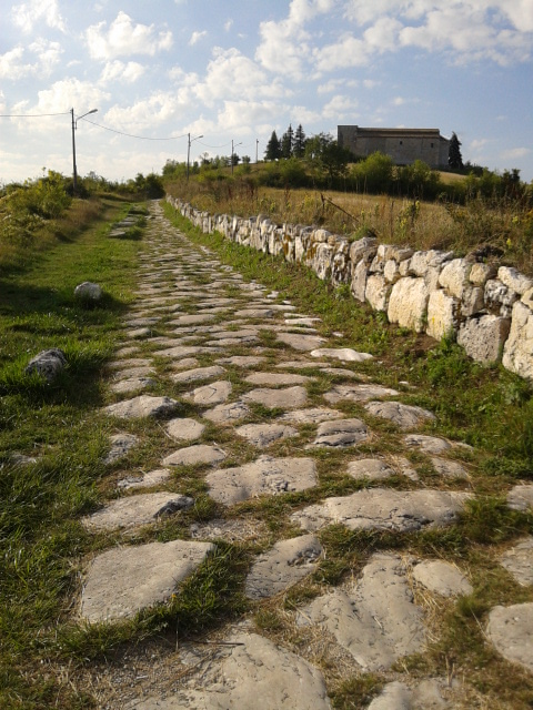 La strada che porta alla chiesa di San Pietro